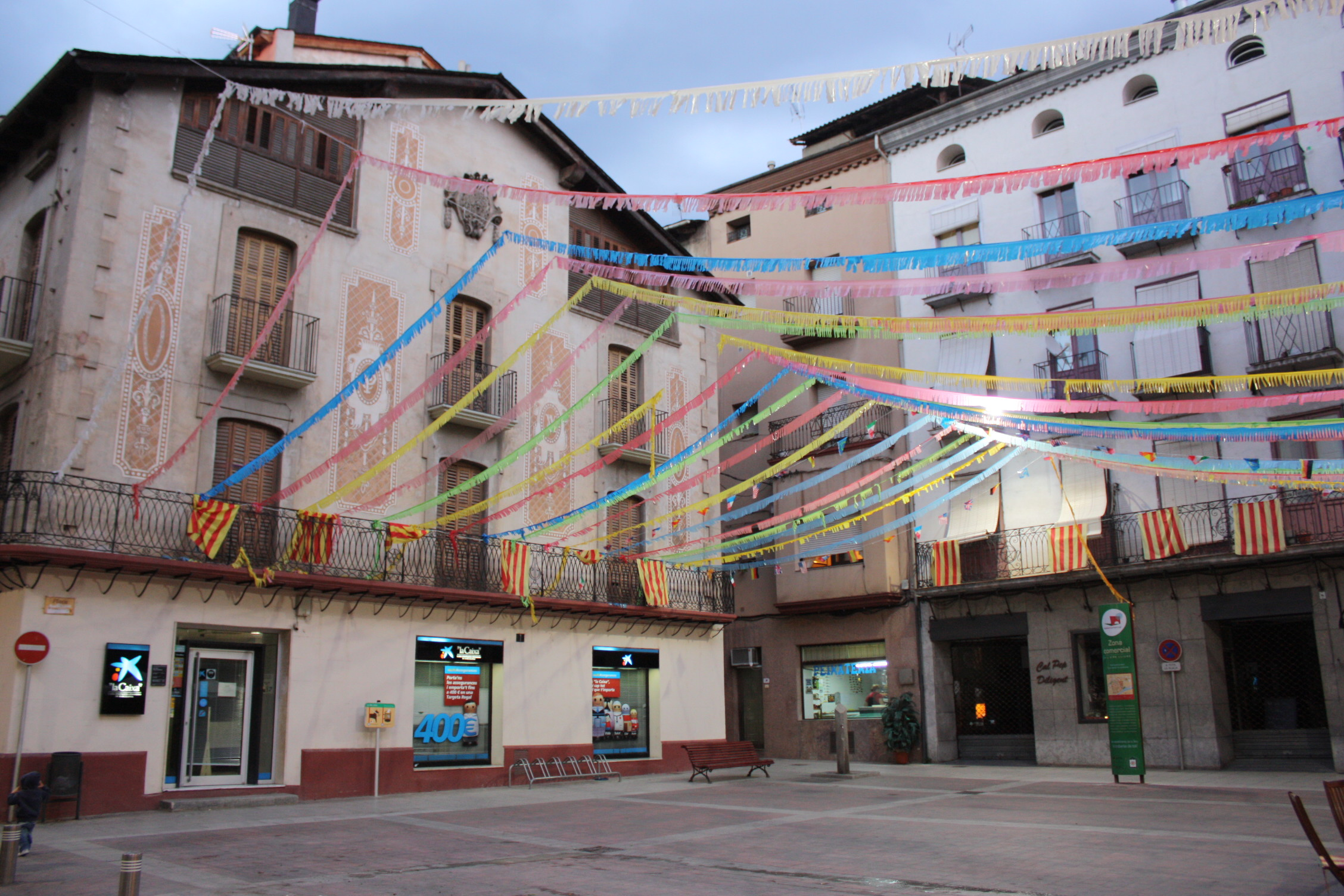 Plaça del mercat, plaça de Patalín o plaça d'Espanya de la Seu d'Urgell.